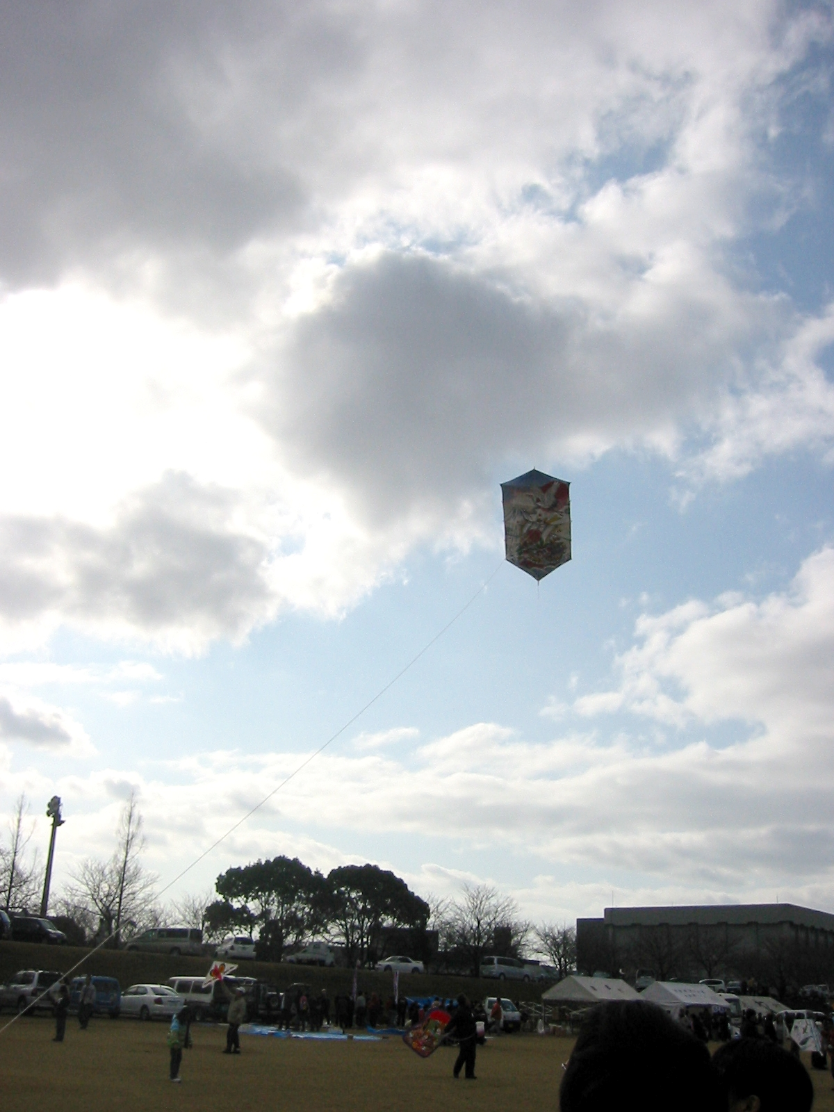 童謡の里龍野凧あげ祭り 六角凧